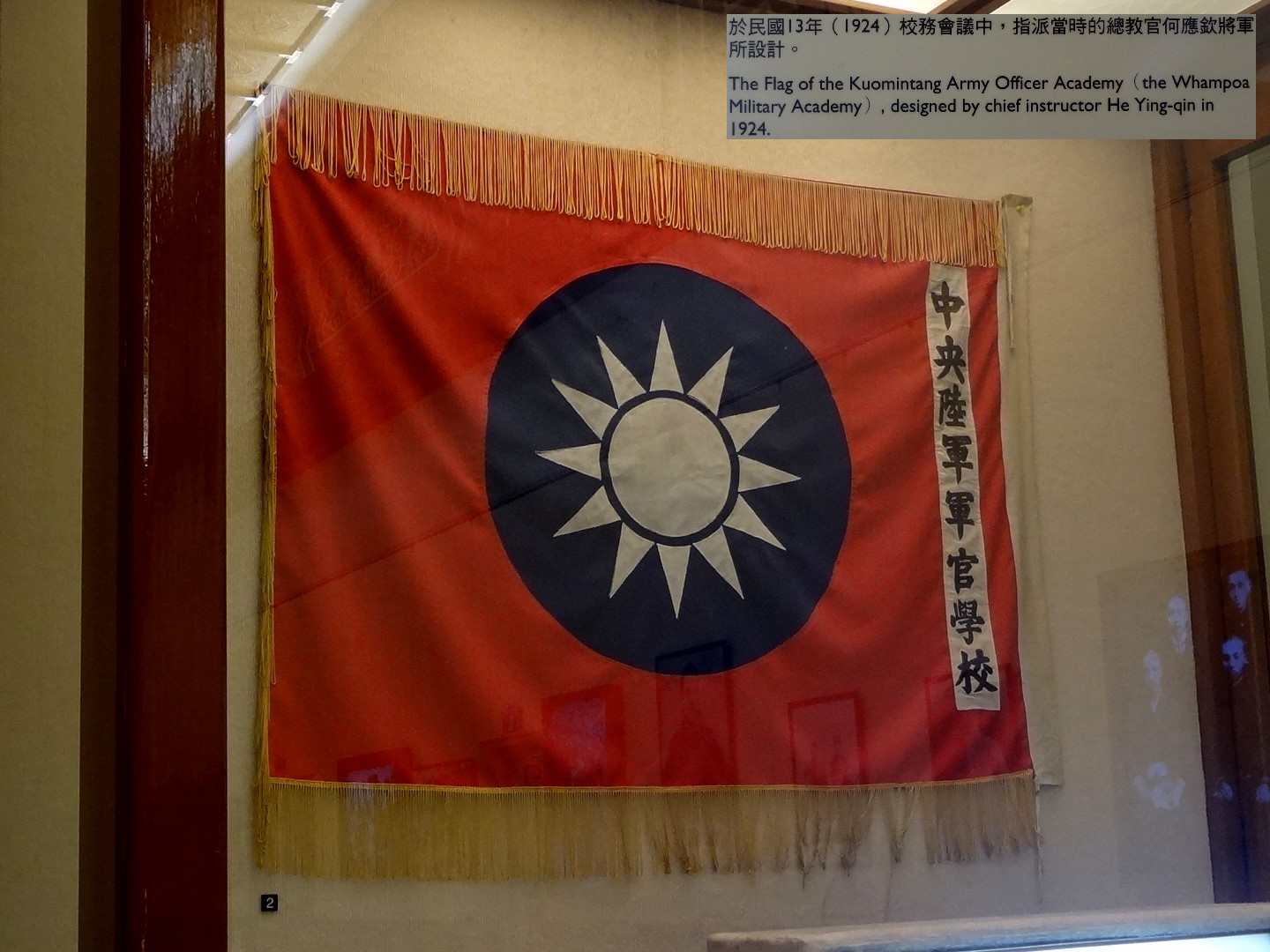 國立中正紀念堂展示的中央陸軍軍官學校校旗，何應欽設計。